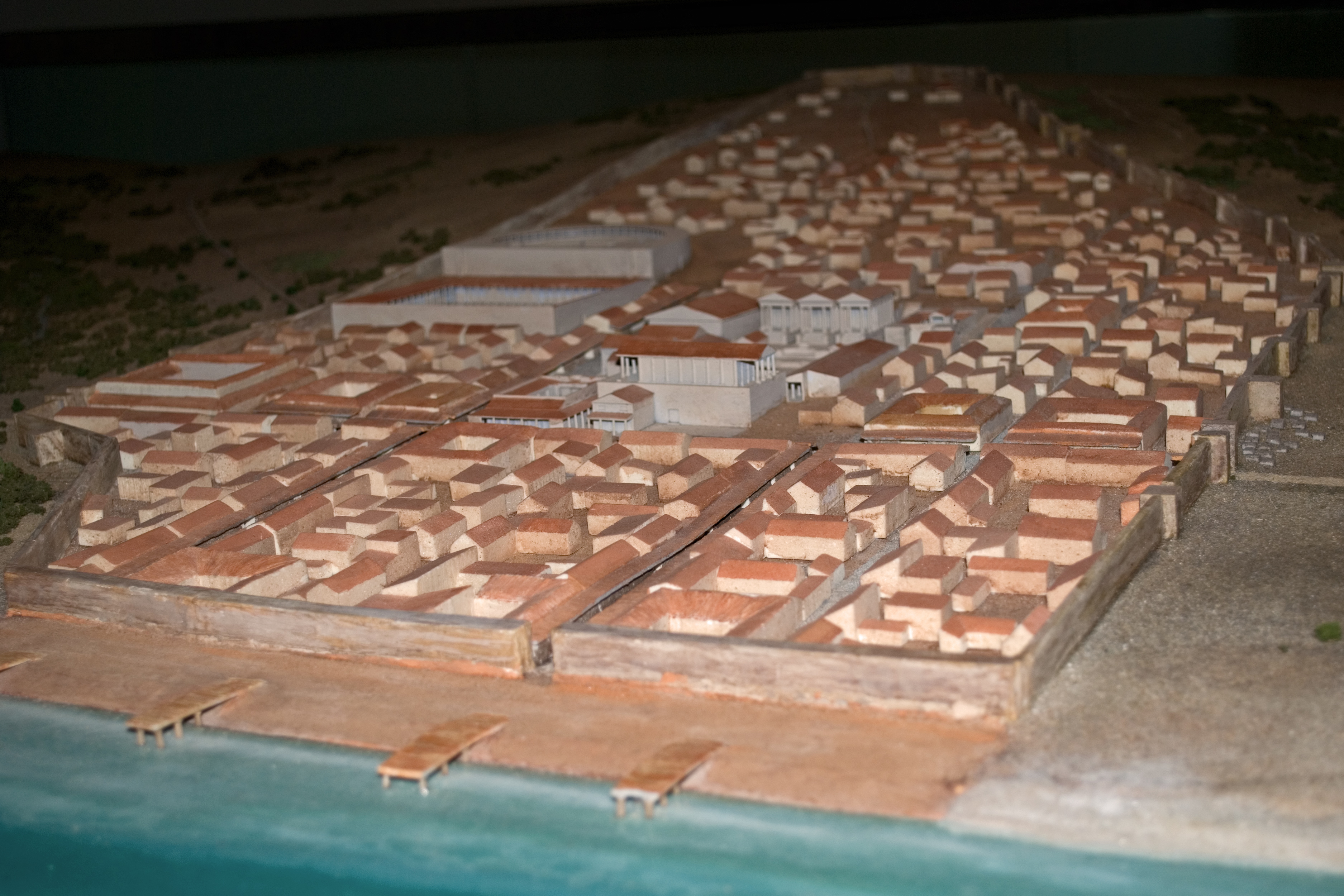 Maqueta de la ciudad romana de Baelo Claudia, en Cádiz, España